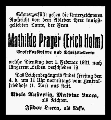 Oznámení v dobovém tisku o úmrtí Mathildy Prager